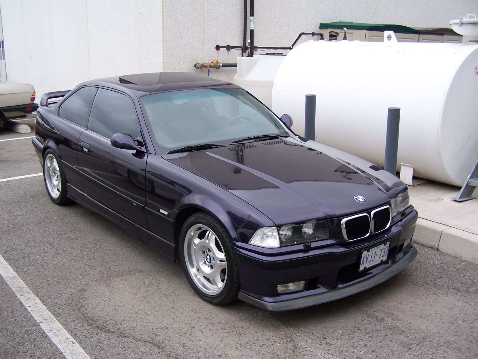 BMW E36 M3 cupé de 1996, versión norteamericana.